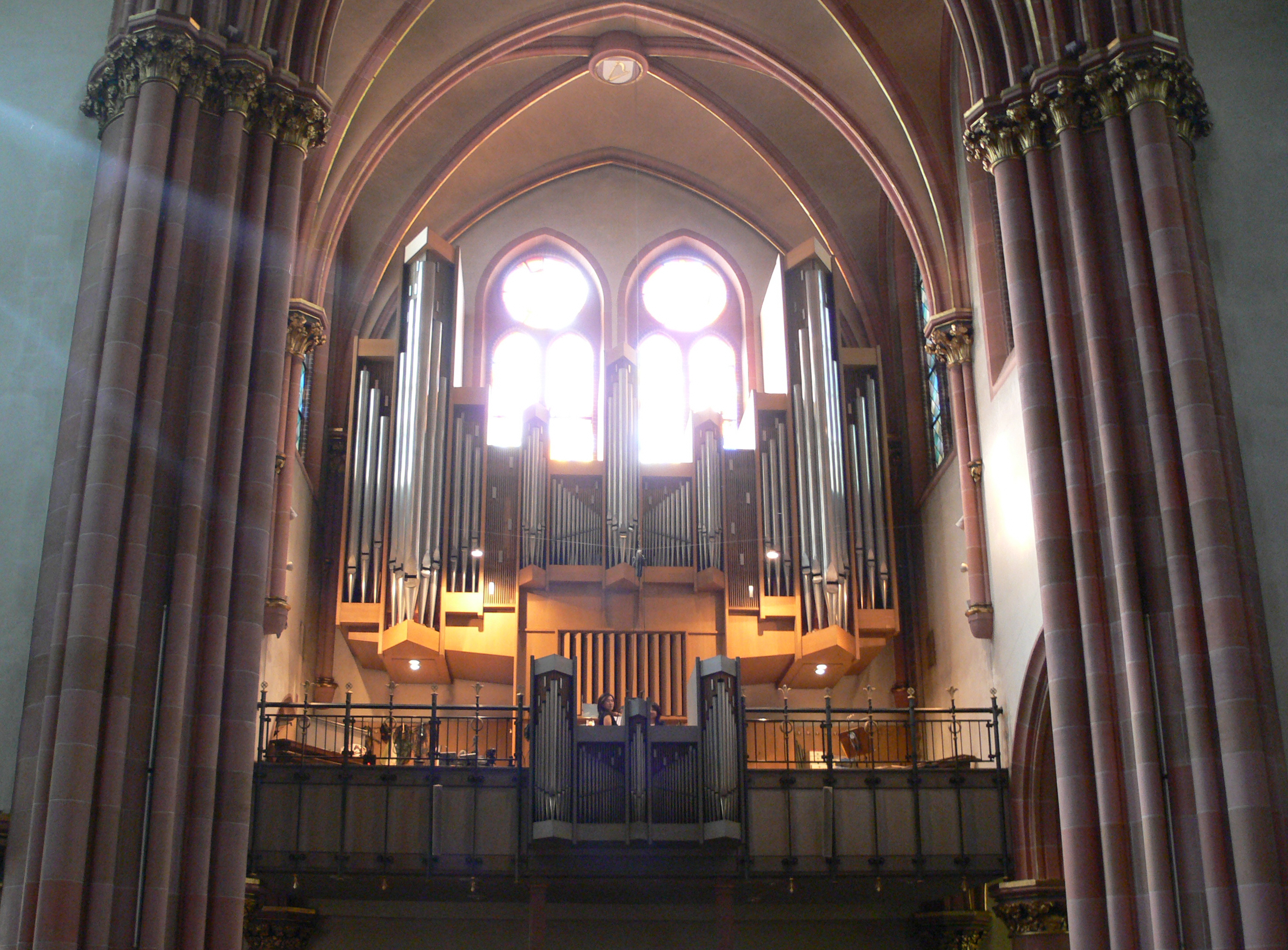 Berlin-Wilmersdorf, St.-Ludwig-Kirche, Blick zur Orgel